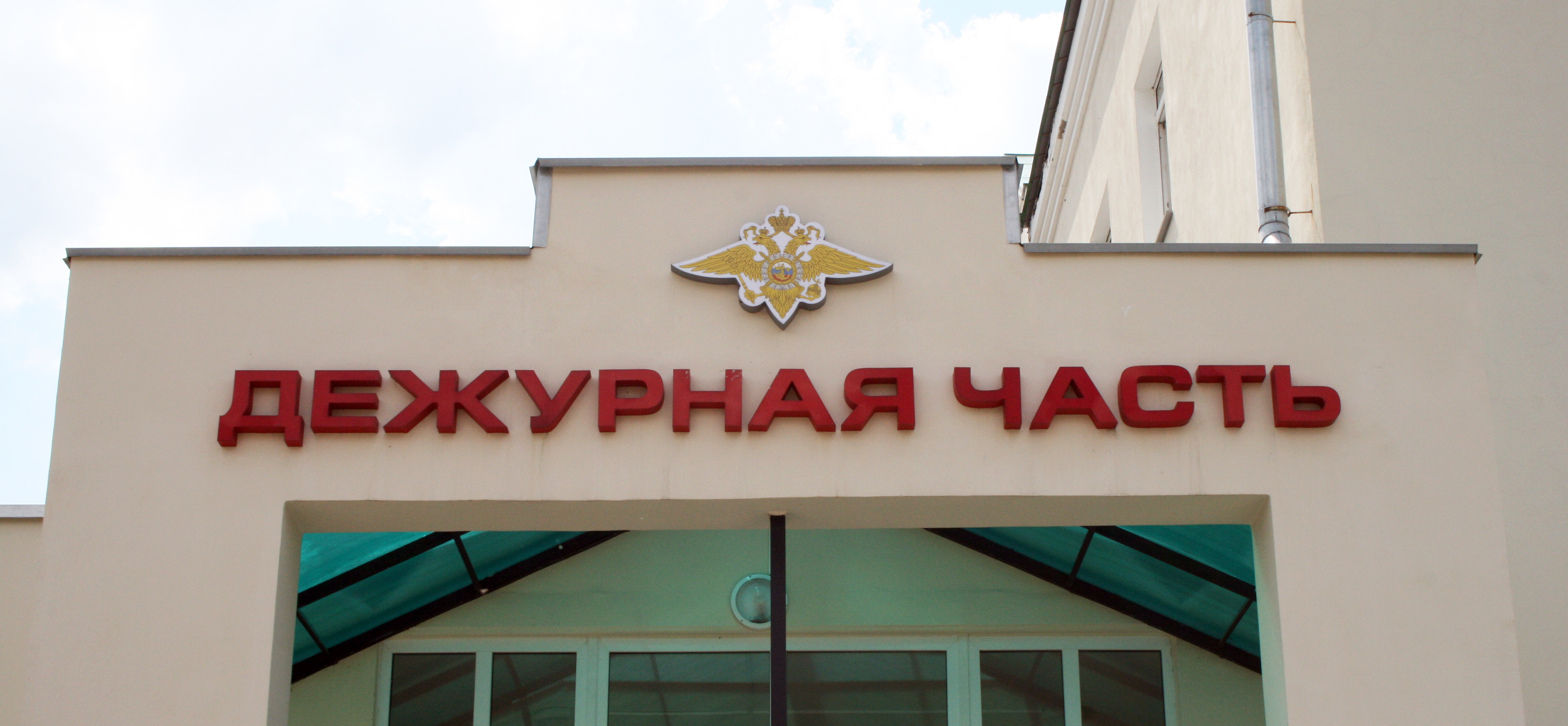 Фасад здания дежурной части территориального органа МВД России